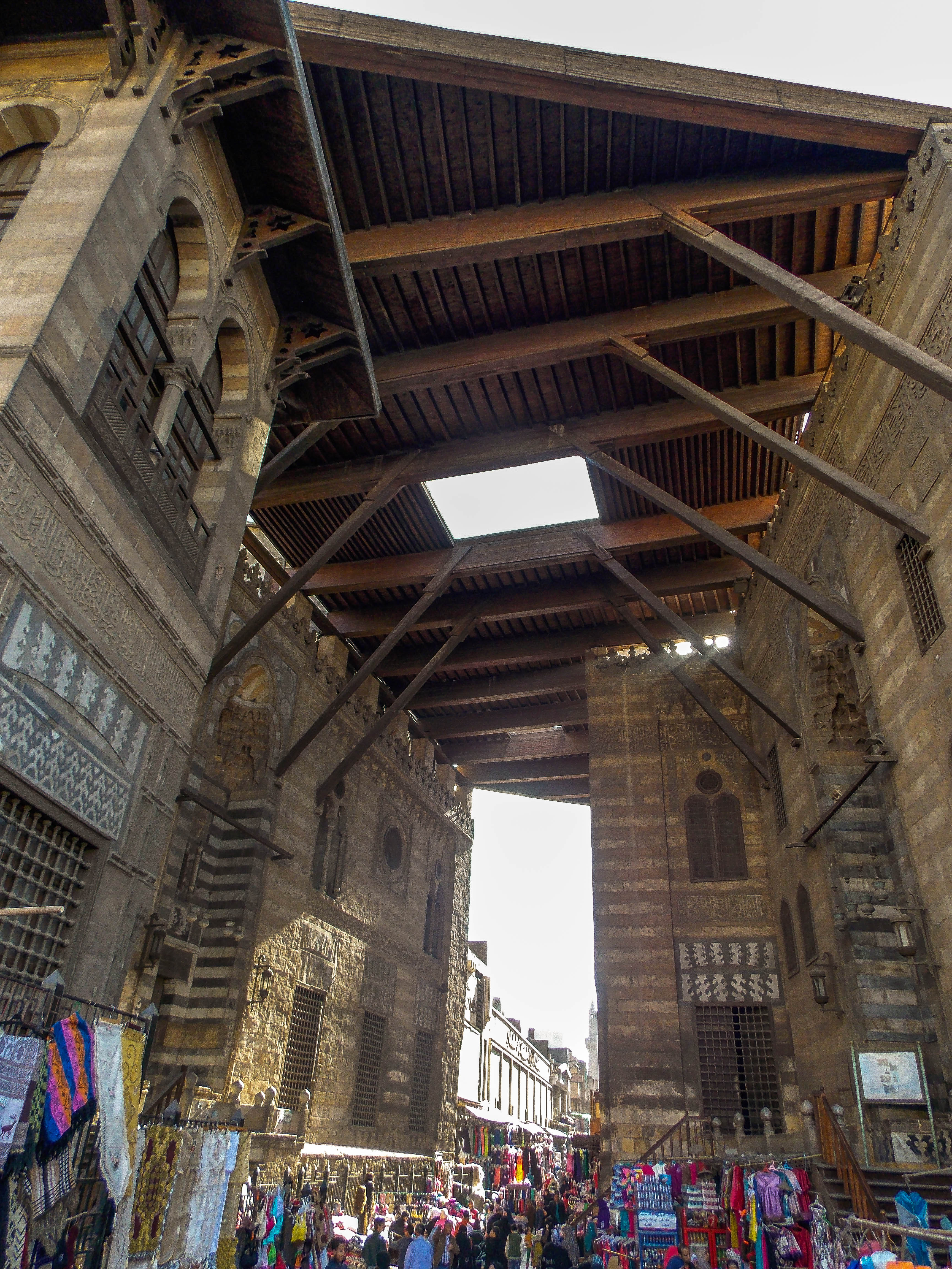 مسجد ومدرسة قنصوه الغوري مدخل شارع التربيعه